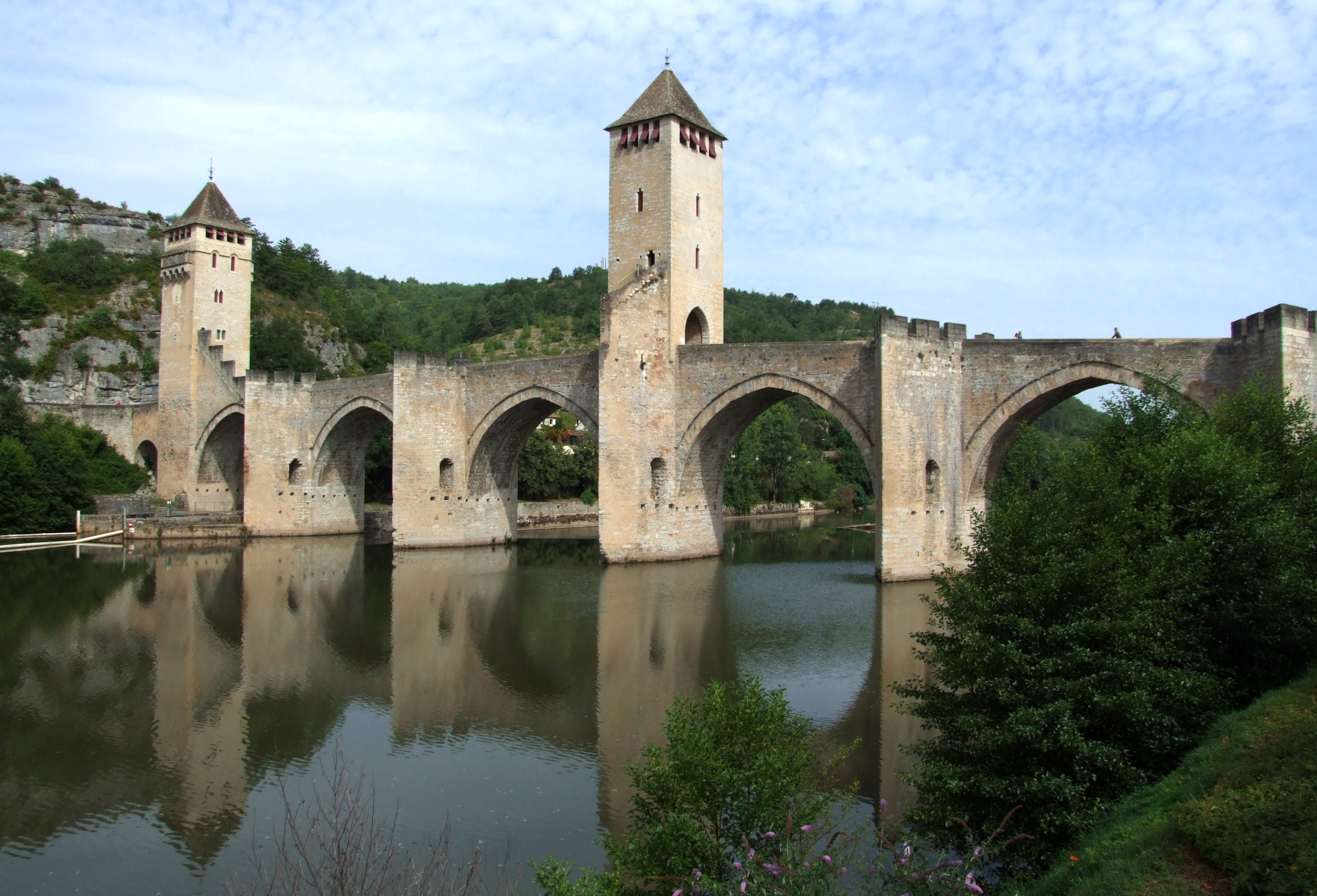 Pont Valentré, Cahors, Lot, FRANCE